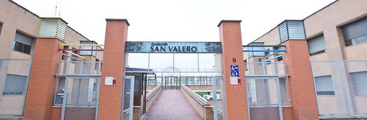 Fundación San Valero, instalaciones de la calle Violeta Parra 9, Zaragoza.